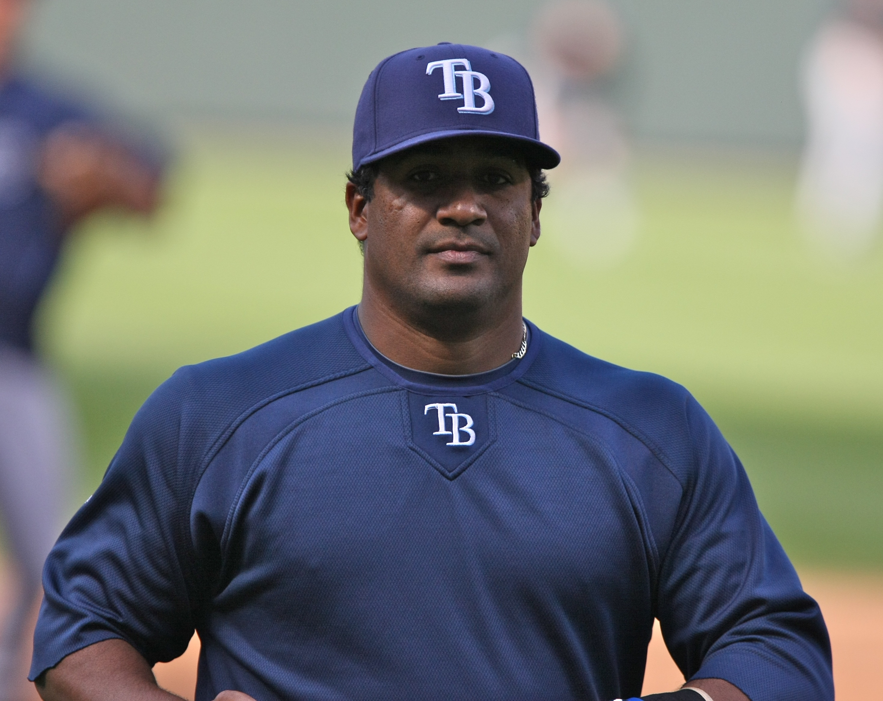 Michel Hernández